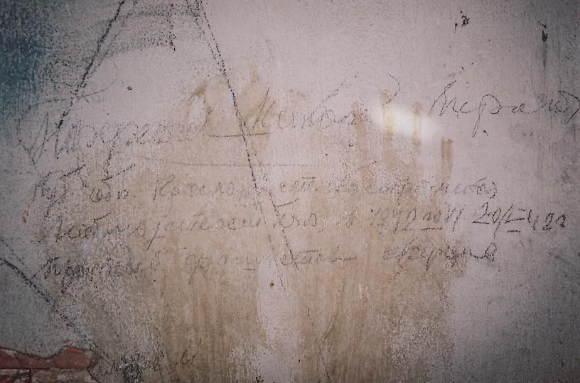 На колокольне Екатерининского собора г. Краснодара